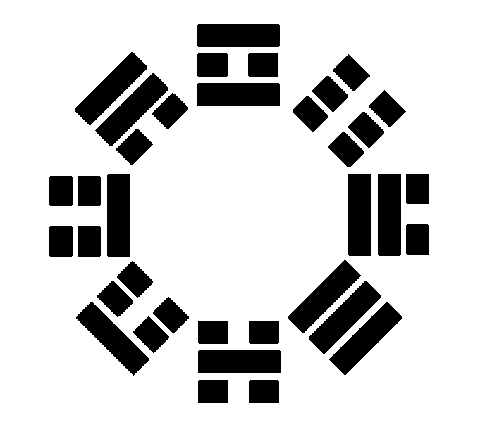 trigramas do Pa Kua (Ba Gua) dispostos segundo o arranjo Pós Natal